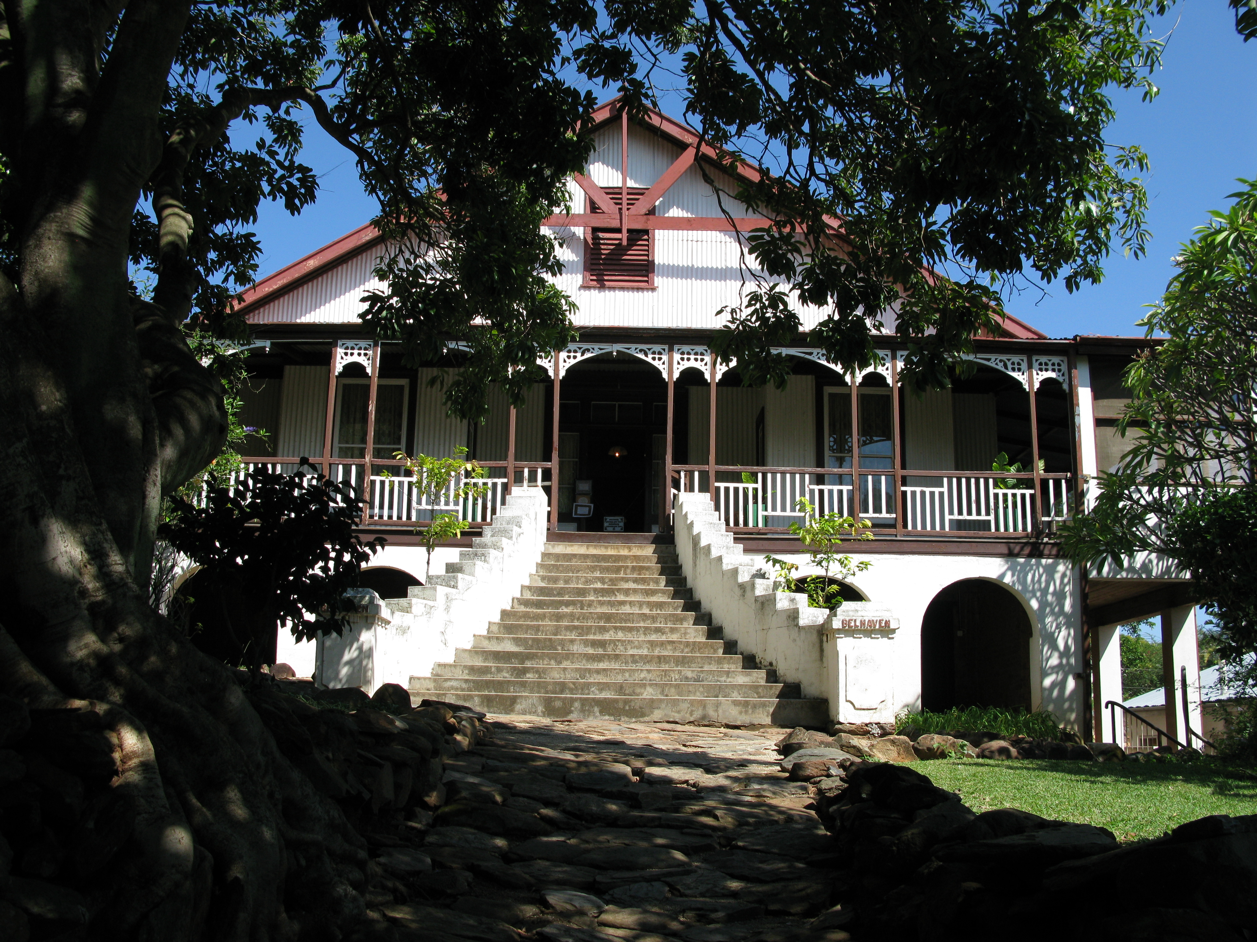 Belhaven Museum, Lee Straat, Barberton This media shows a South African Protected Site with SAHRA file reference 9/2/203/0003.